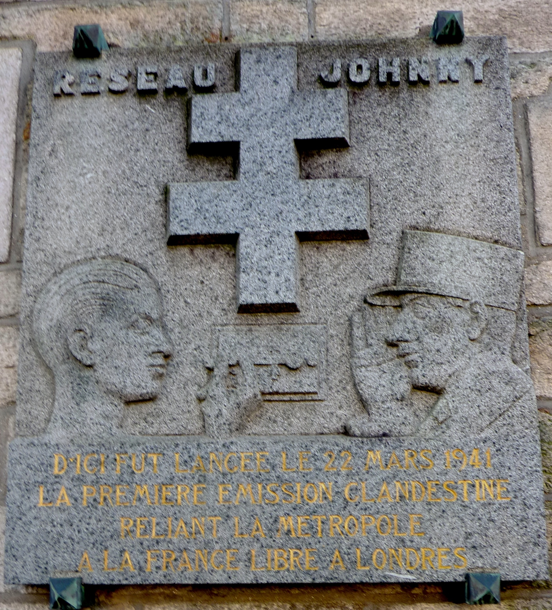 Quimper-Kerfeunteun: plaque commémorative de la première émission de radio clandestine émise par le réseau Johnny à destination de Londres (au 24, avenue de la France Libre)